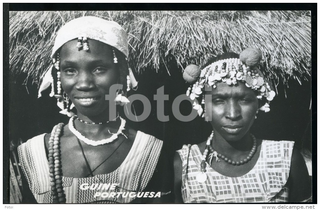 Postcard: CI No 71 - Raparigas beafadas com adornos - Fulacunda